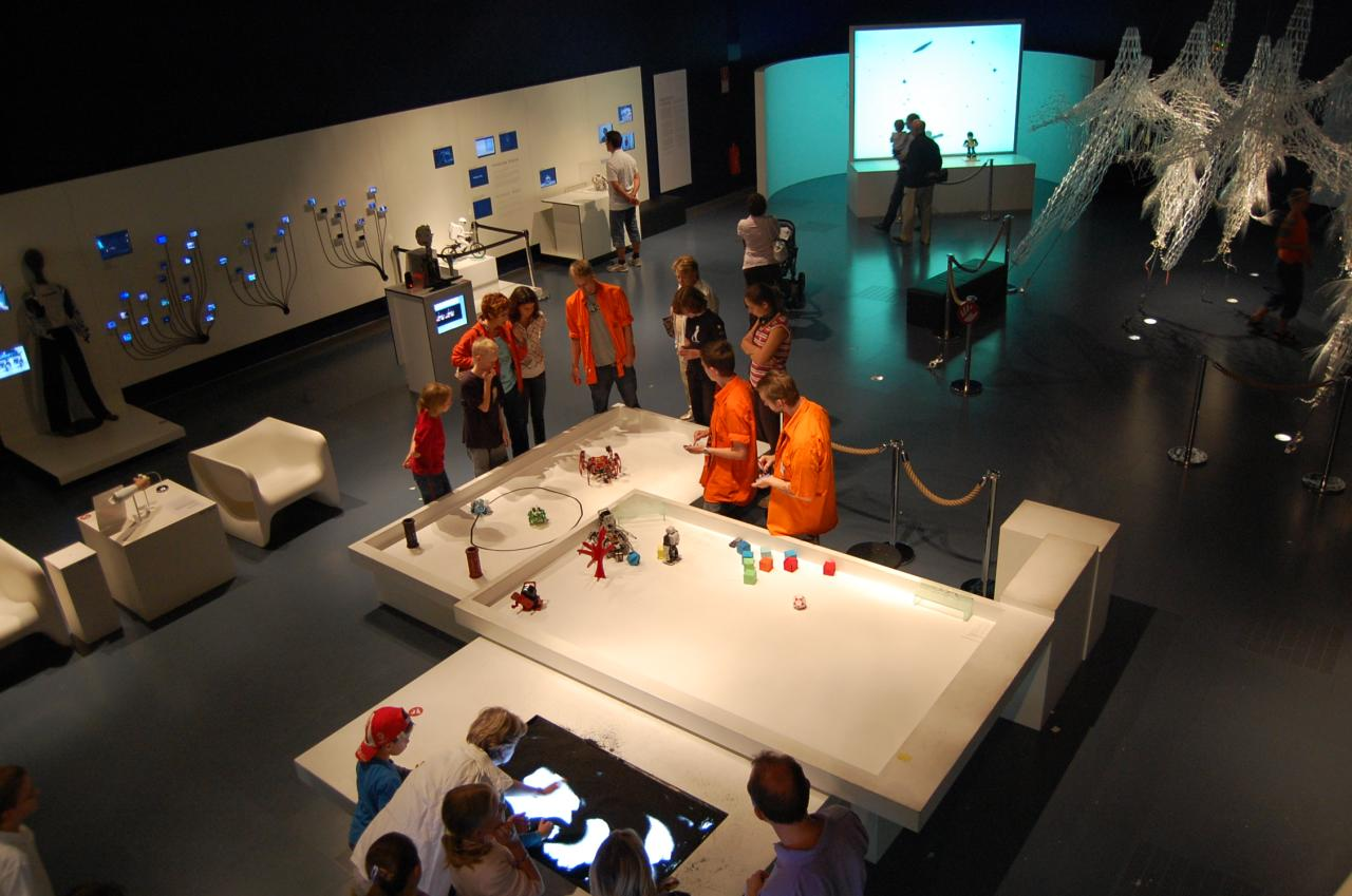 ARS Electronica Linz Austria